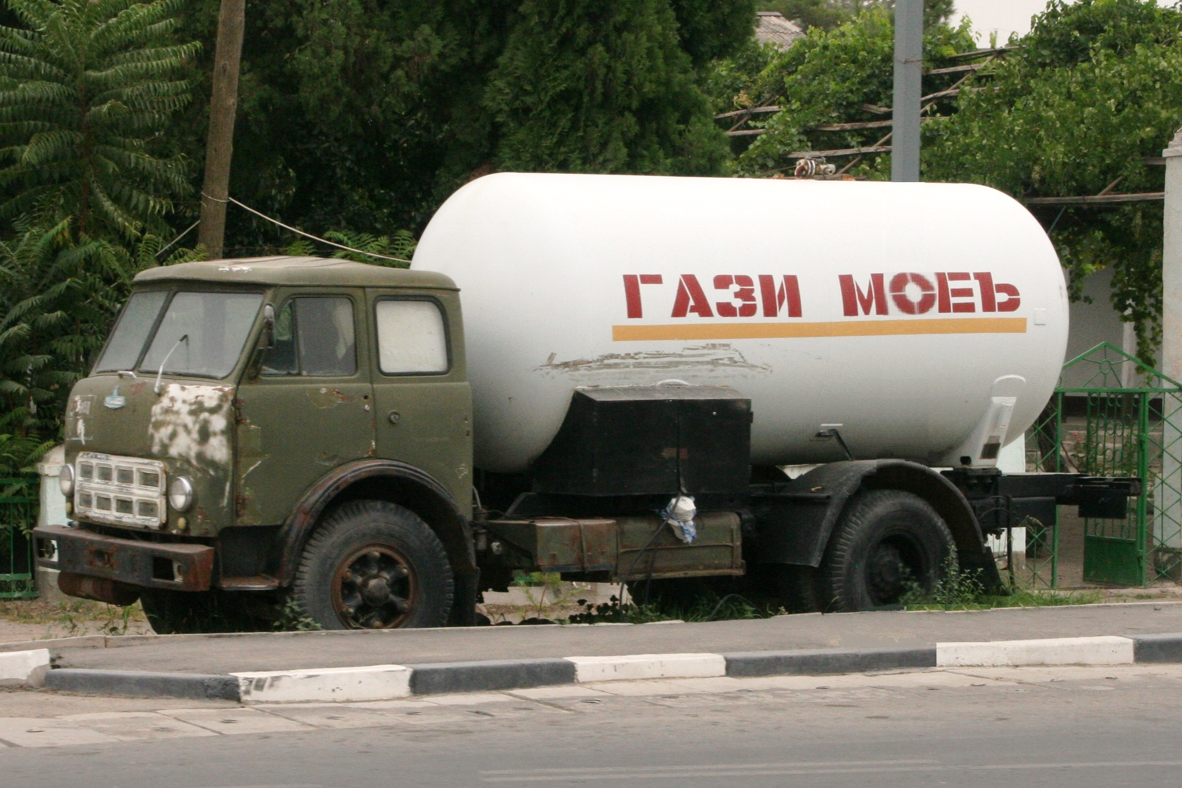 MAZ-500A, umgebaut zum Flüssiggastanker in Duschanbe, Tadschikistan. Laternenmast rausretuschiert.